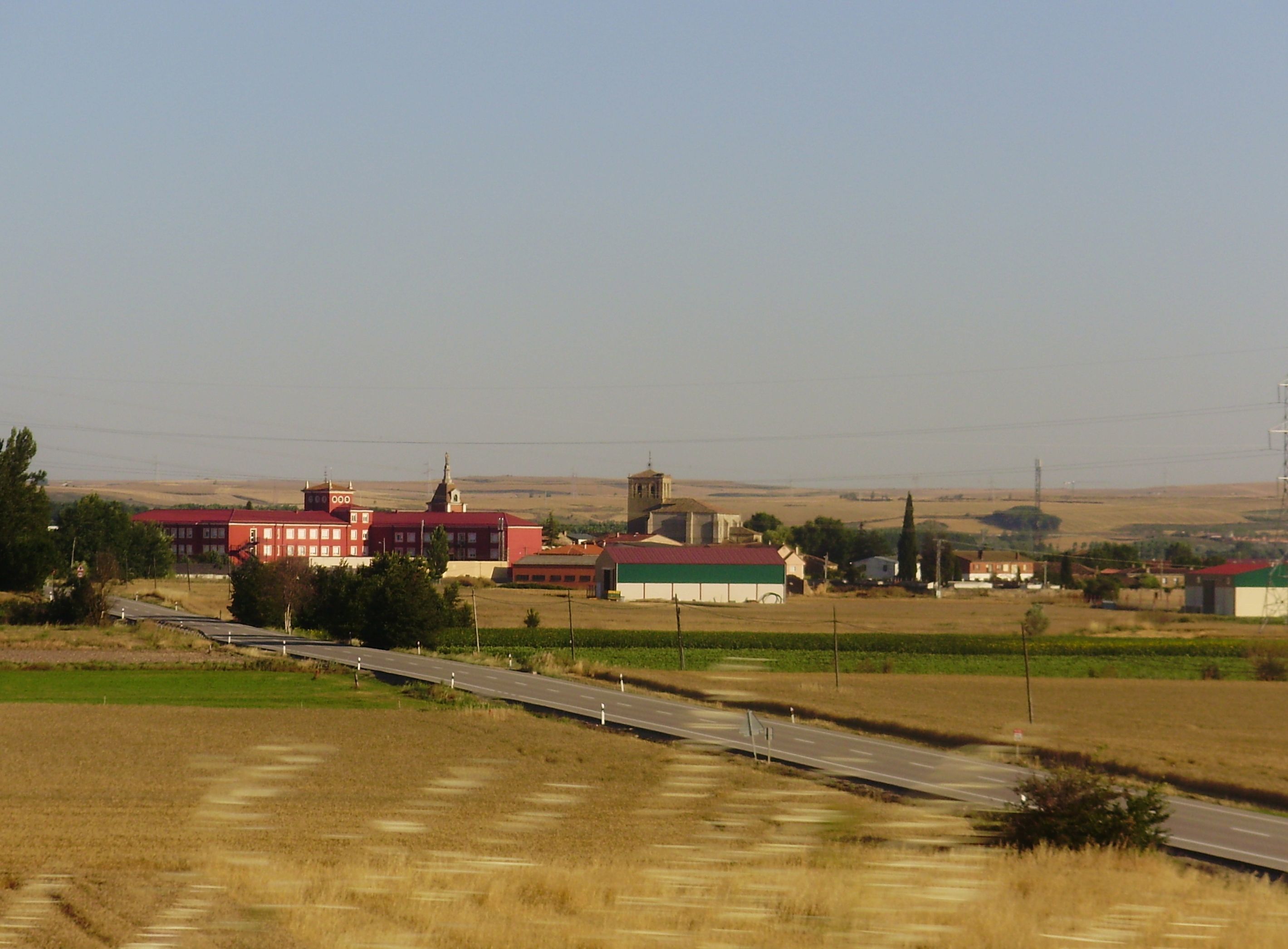 Vista de Tardajos, Burgos, Castilla y León, España